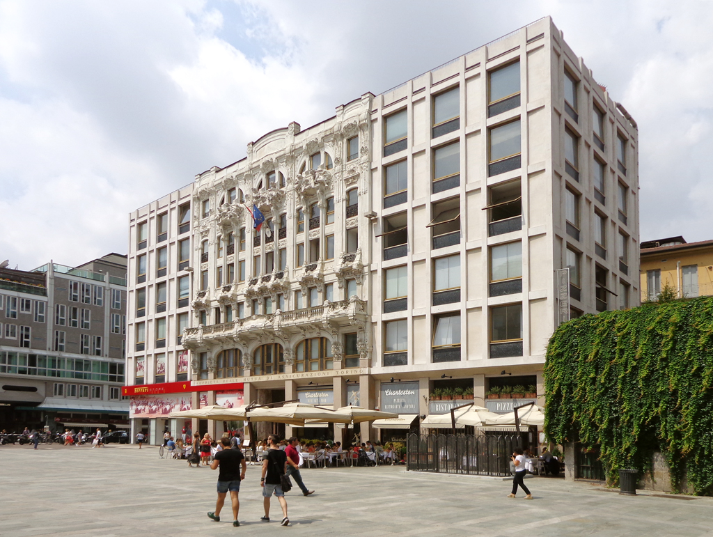 Milano, edificio in piazza del Liberty 8.